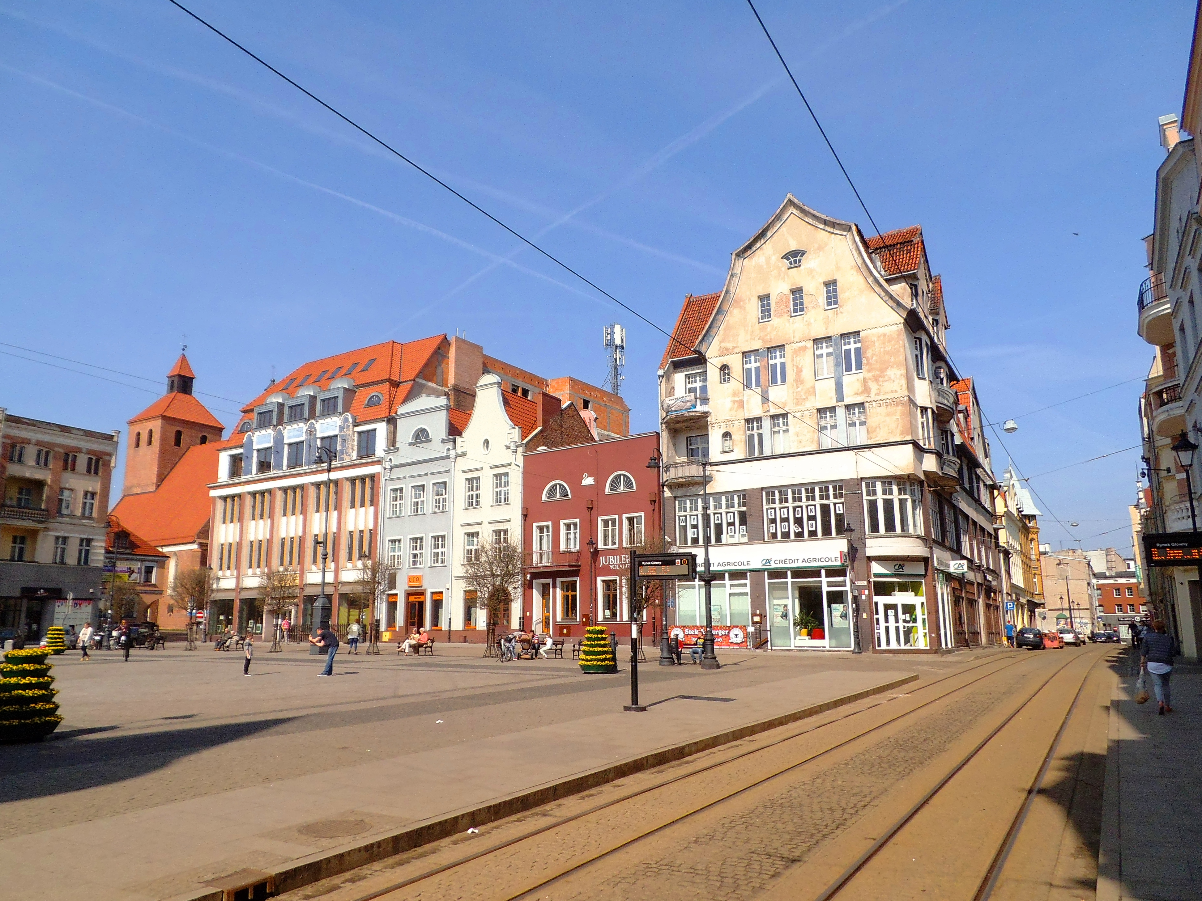 Rynek Główny w Grudziądzu